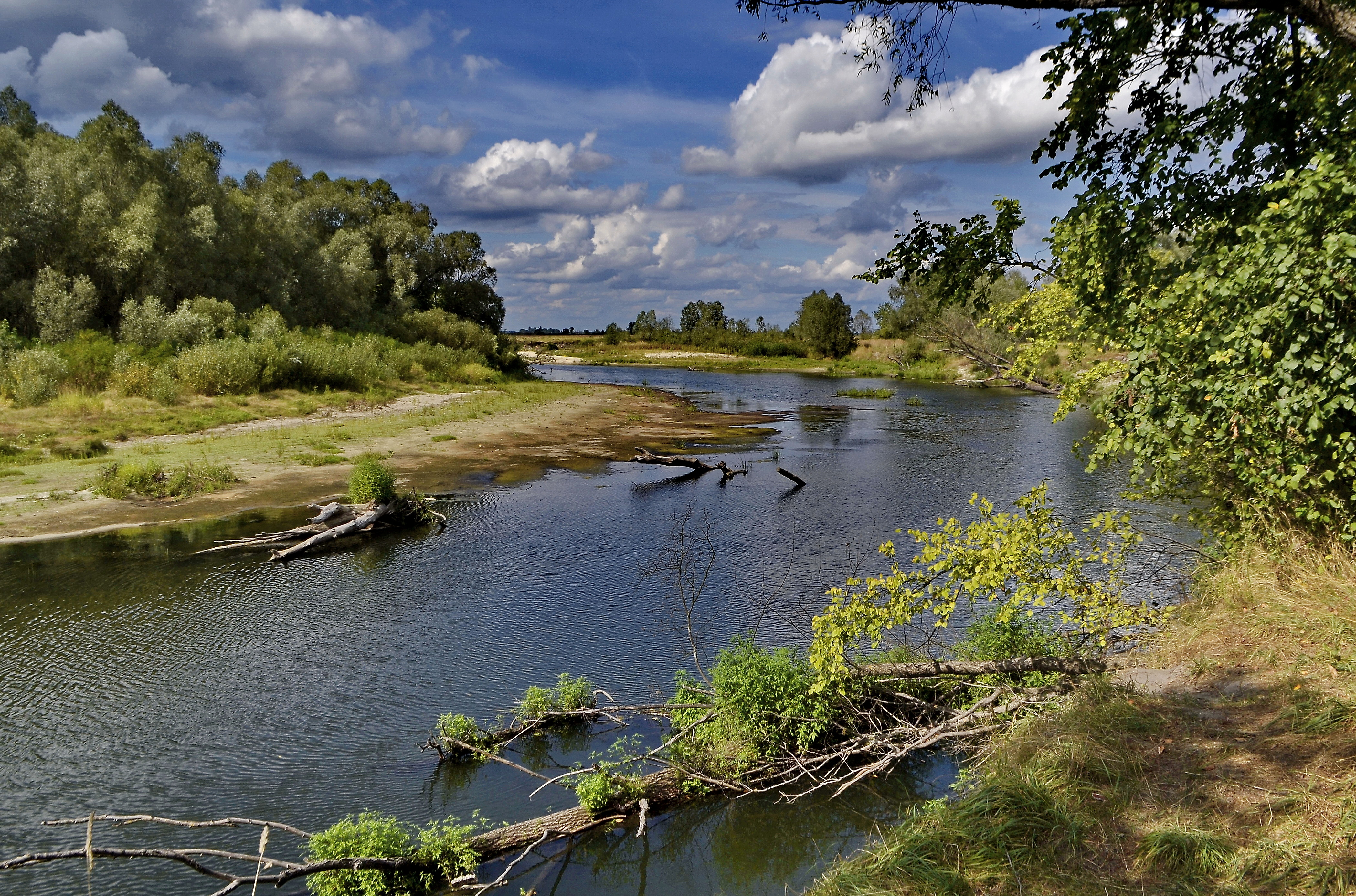 «Залісся», Броварський район, Літочківська, Літківська, Семиполківська, Рожнівська, Богданівська, Жердівська сільські ради